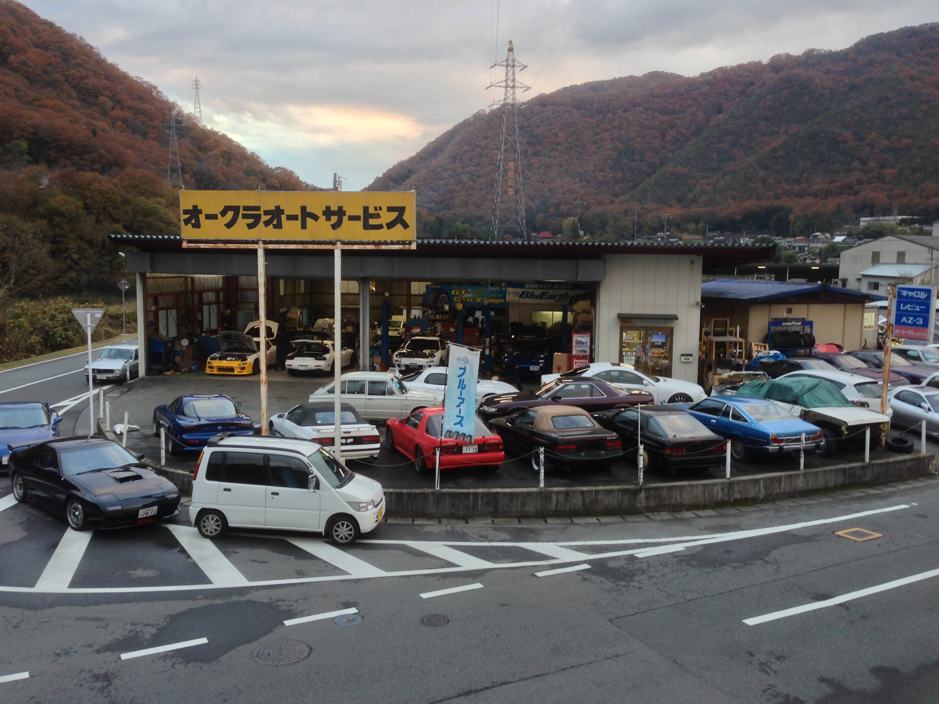 岡山県高梁市のオークラオートサービス